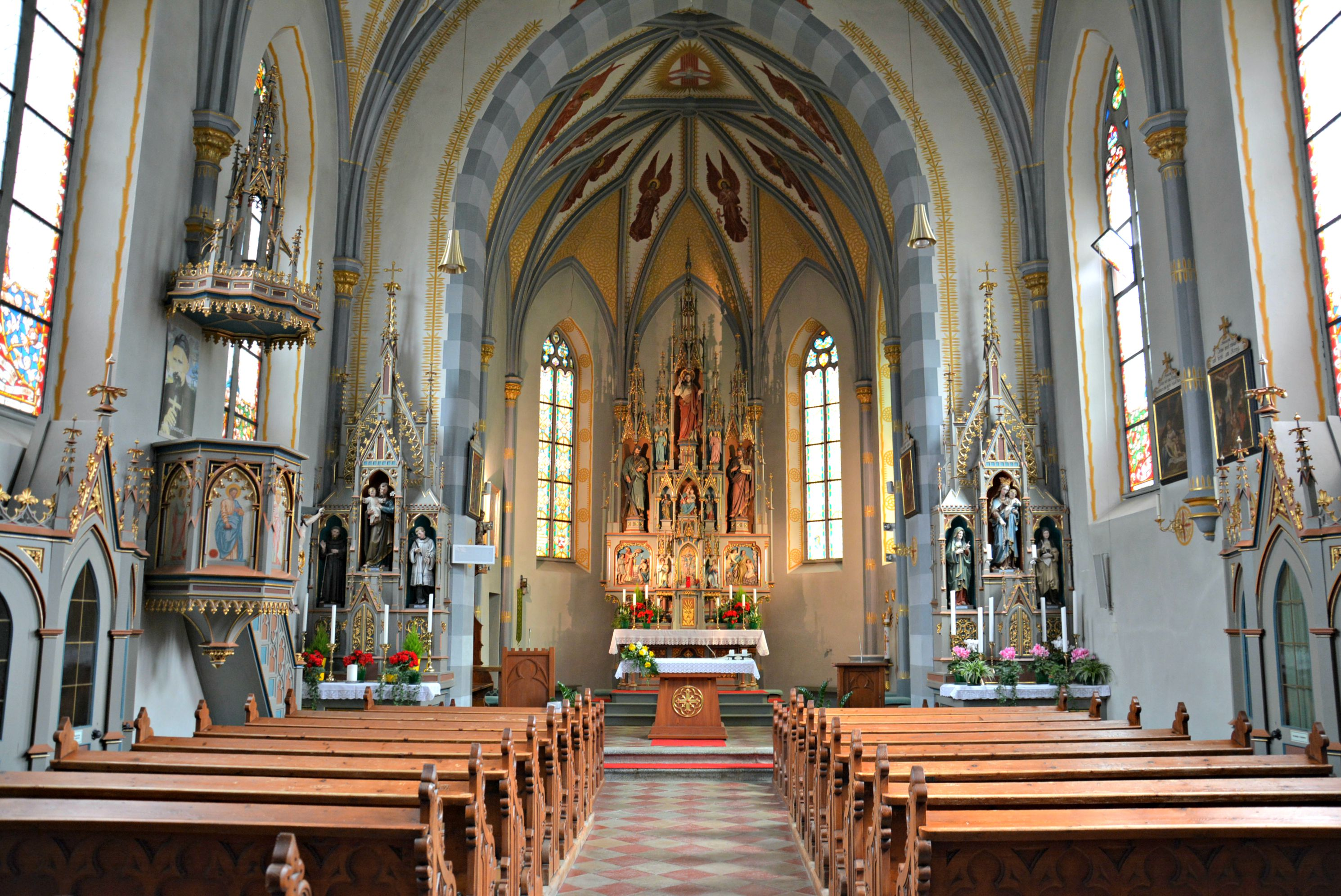 Vedi titolo